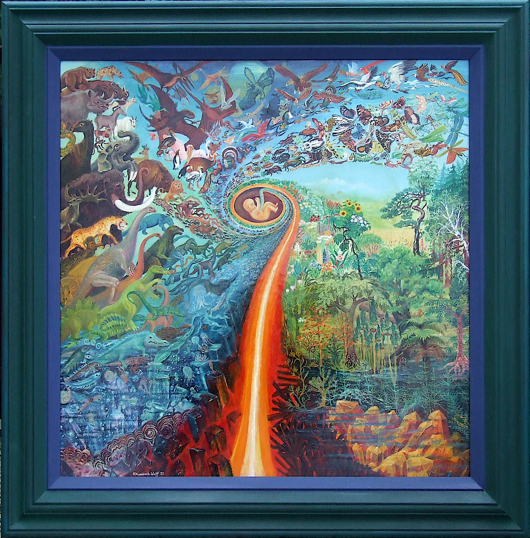 Olga Knoblach-Wolff, Evolution, 1993